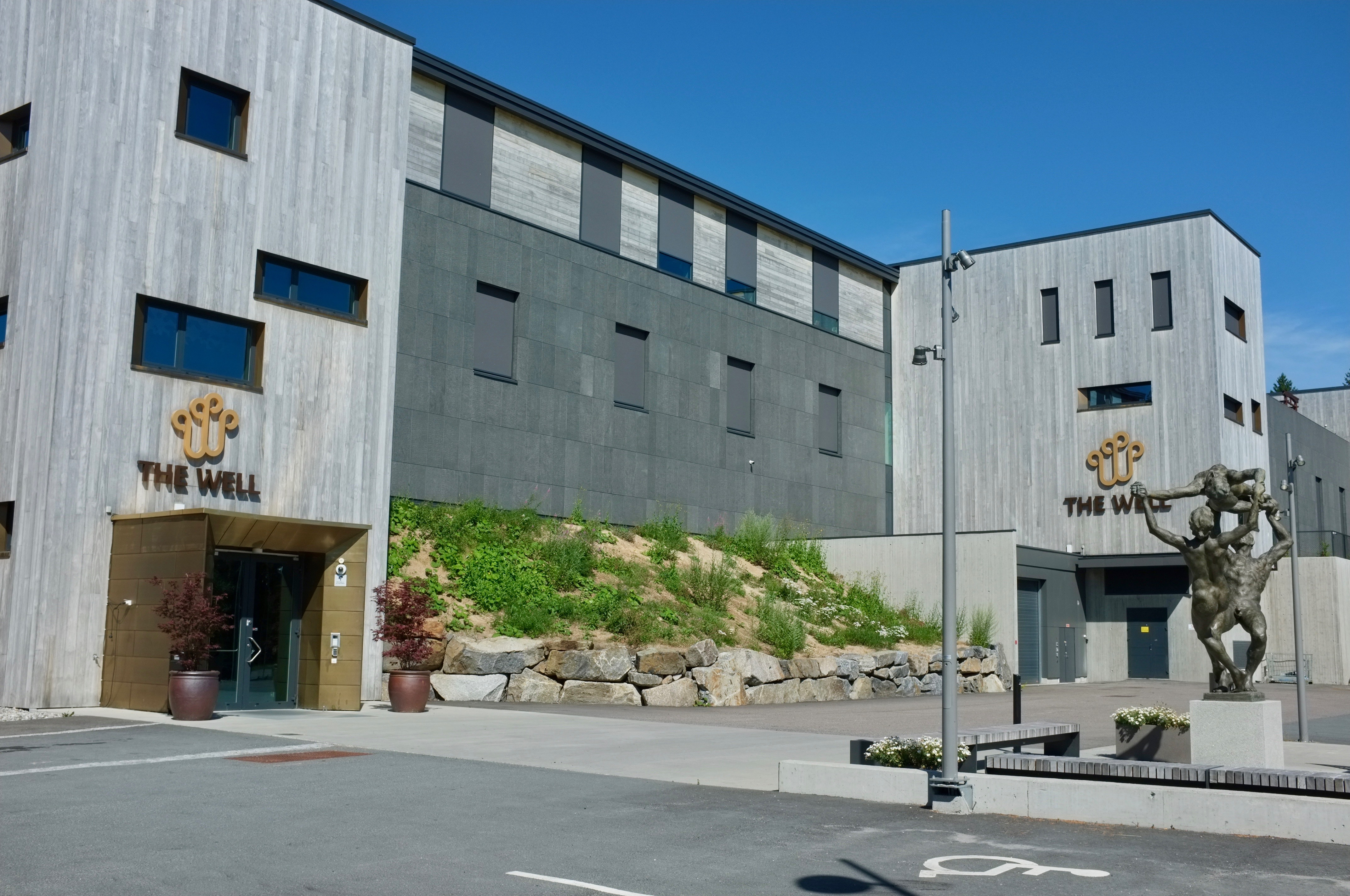 The Well, et spa- og velværesenter på Kolbotn i Akershus.